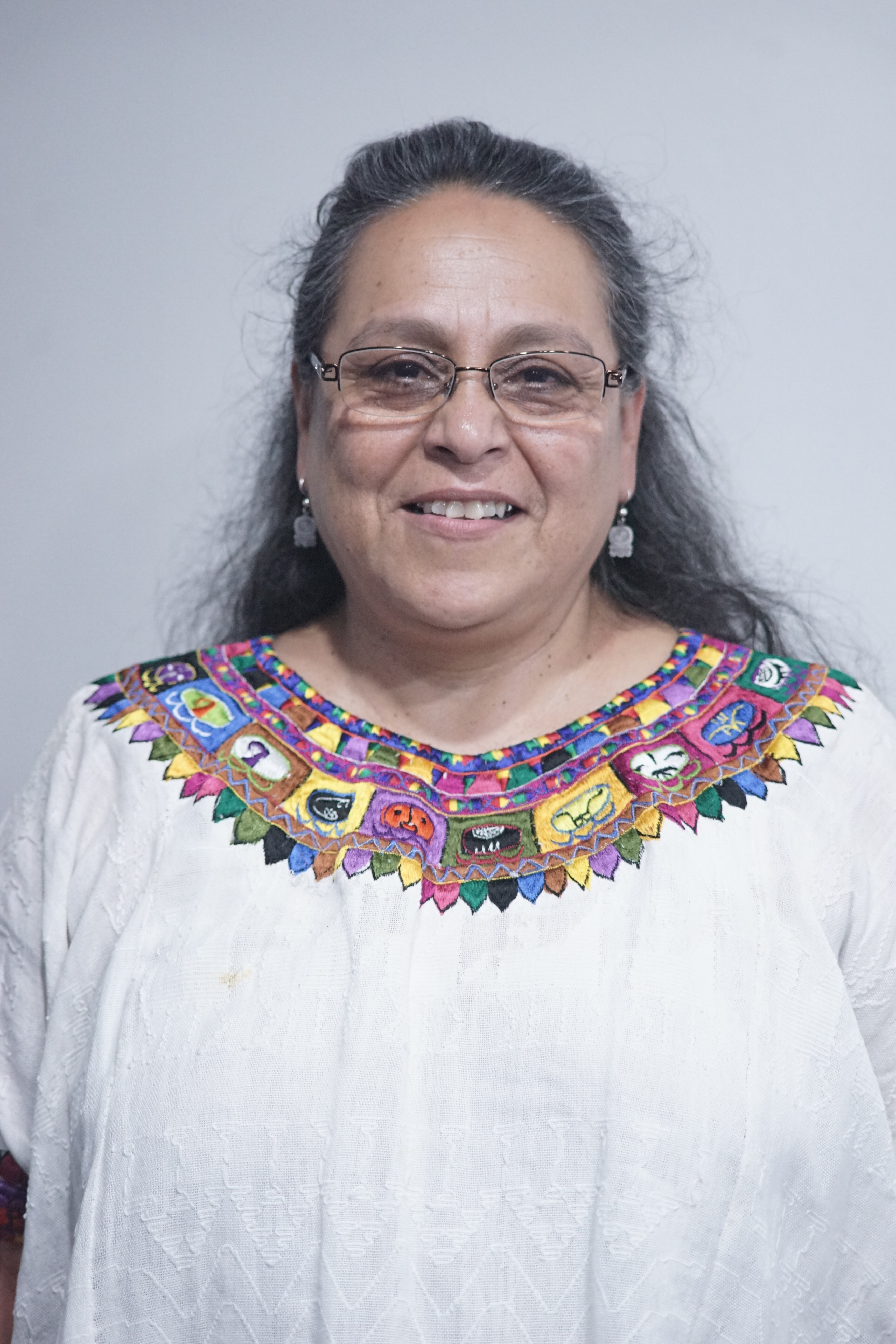 La diputado durante un evento del Día Internacional contra la Homofobia, la Transfobia y la Bifobia en Alianza Francesa, Guatemala